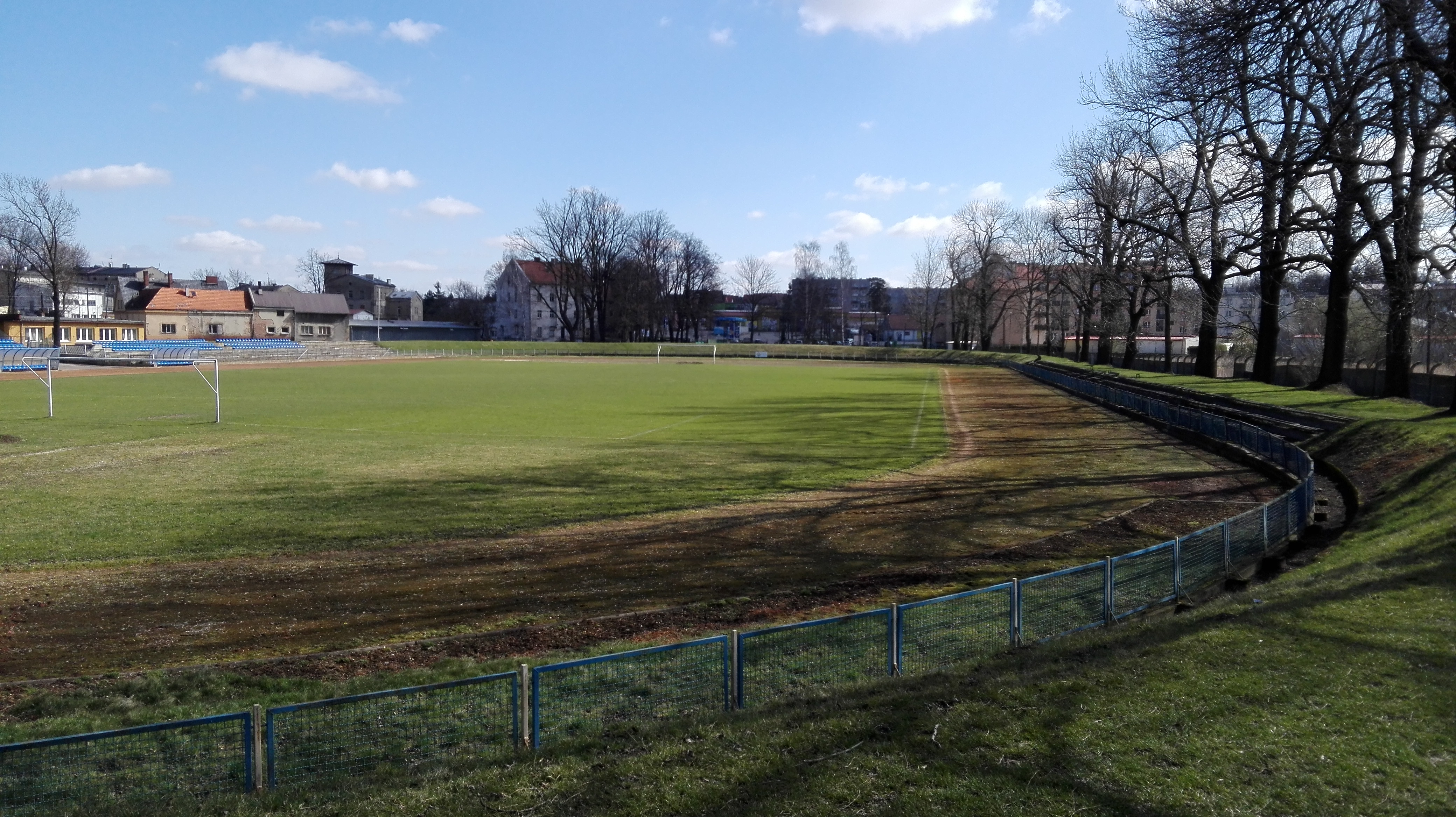 Prudnik, fragment stadionu sportowego przy ulicy Kolejowej